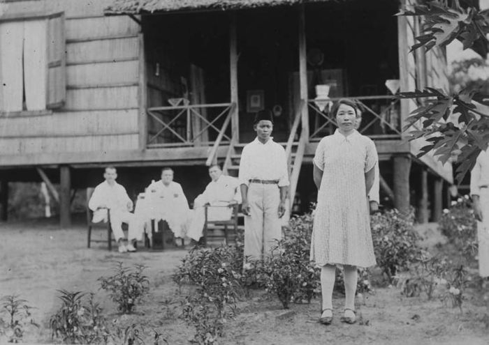 Foto. Het huis van medewerkers van een boorterrein in de omgeving van Betoeng